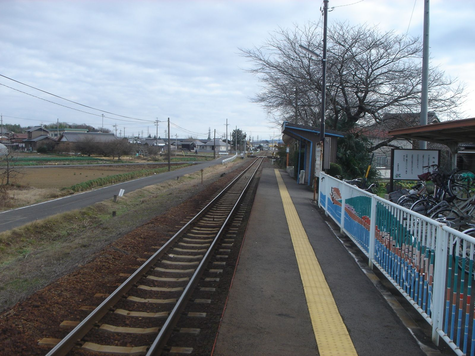 Kamono Station (長良川鉄道越美南線、加茂野駅）,Minokamo,Gifu,Japan(岐阜県美濃加茂市)で撮影。